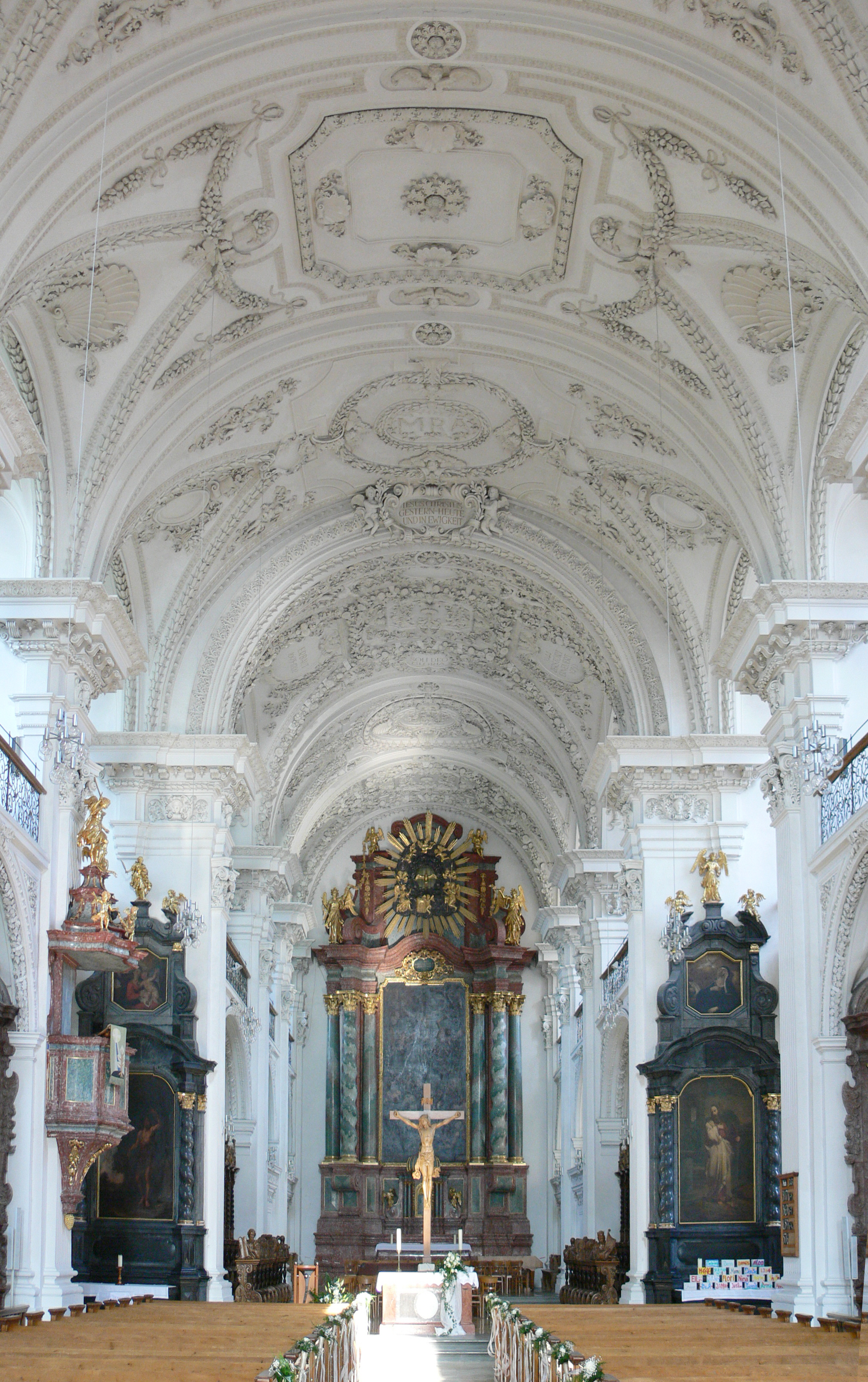 Schlosskirche Friedrichshafen (ehem. Klosterkirche Hofen) Blick zum Chor